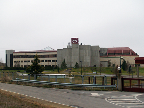 Edificio que alberga los servicios centrales y telefónicos de la entidad.